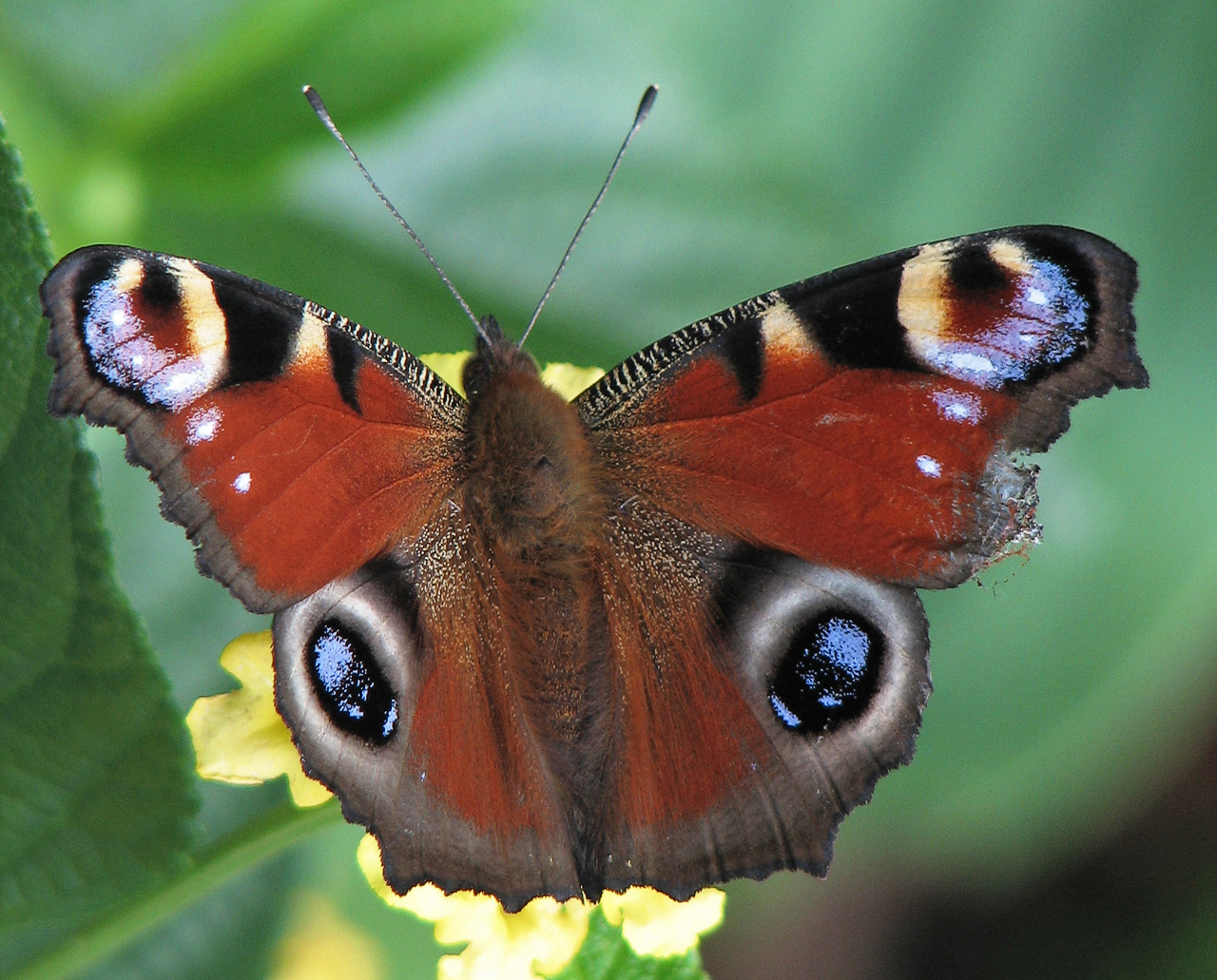 Beschreibung: Tagpfauenauge (Inachis io) / peacock Fotograf: Darkone, 4. August 2005